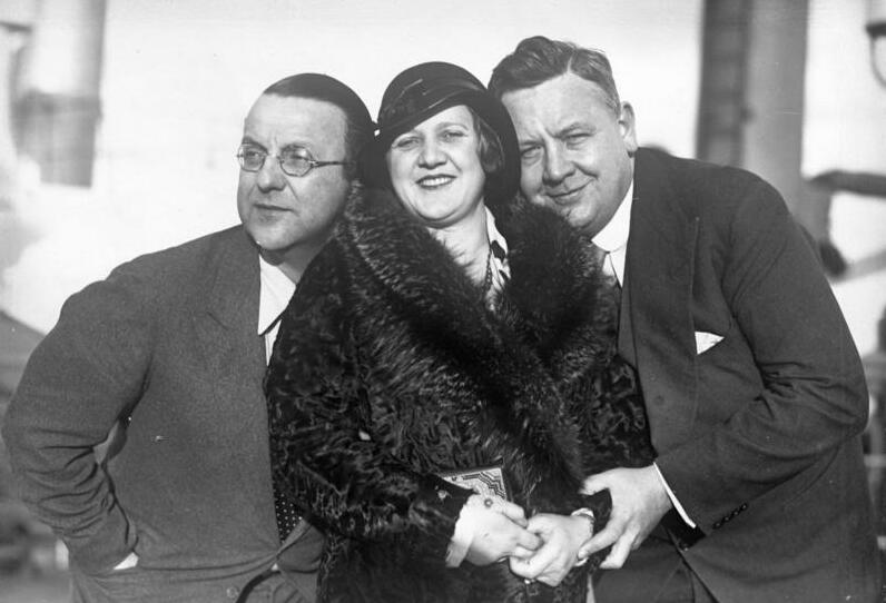 Ein deutsches Künstler-Trio auf dem Wege nach Amerika ! Von links nach rechts: Kammersänger Michael Bohnen, Kammersängerin Elisabeth Rethberg, Kammersänger Lauritz Melchior während ihrer Ueberfahrt an Bord des deutschen Ozean-Schnelldampfers "Europa", um an der New Yorker Metropolitan-Oper aufzutreten.